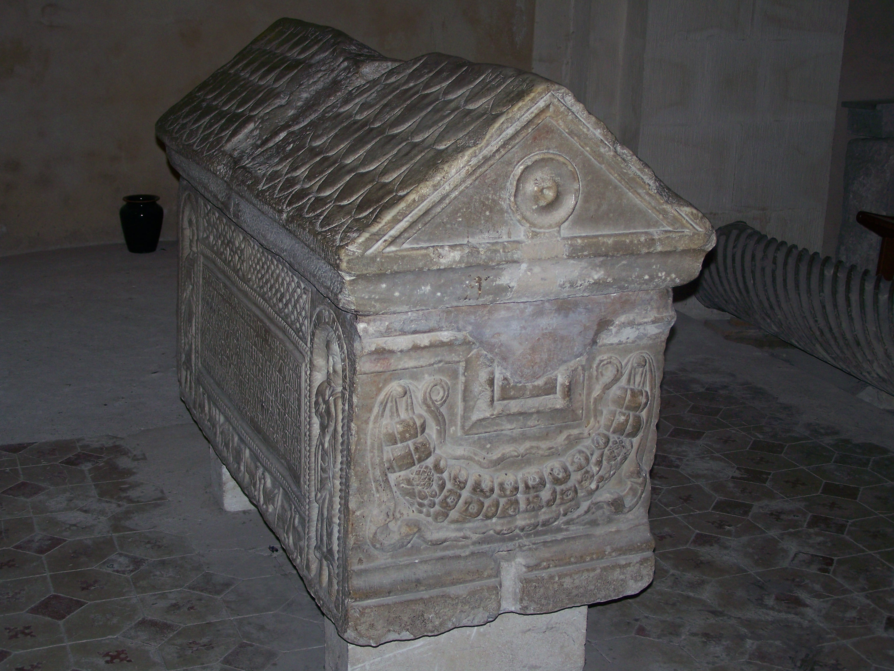 Tombeau de Saint Andéol dans l'église de Bourg-Saint-Andéol (07 France)